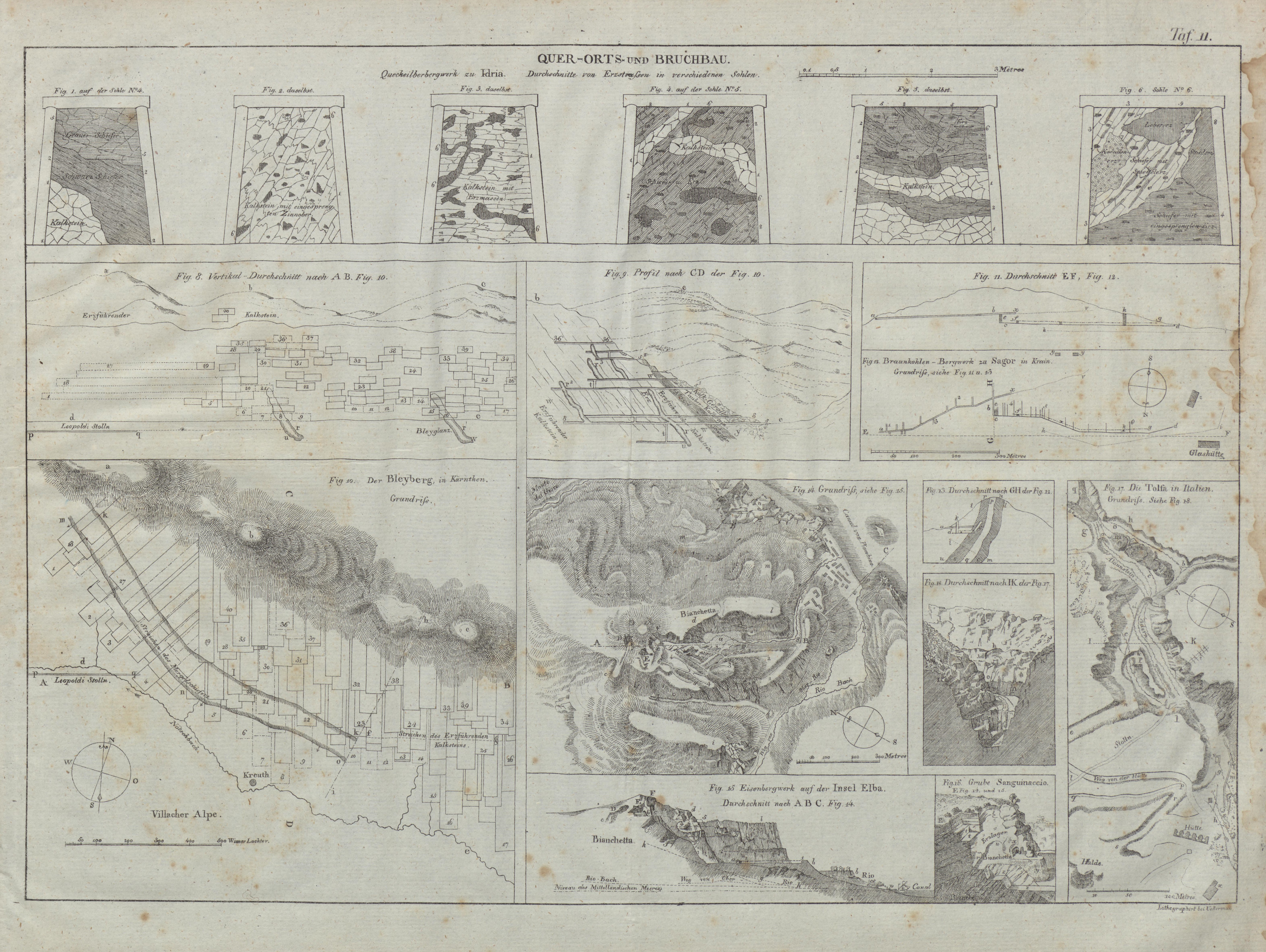 Abbildung aus: Atlas zu des Herrn von Villefosse Mineral-Reichthum